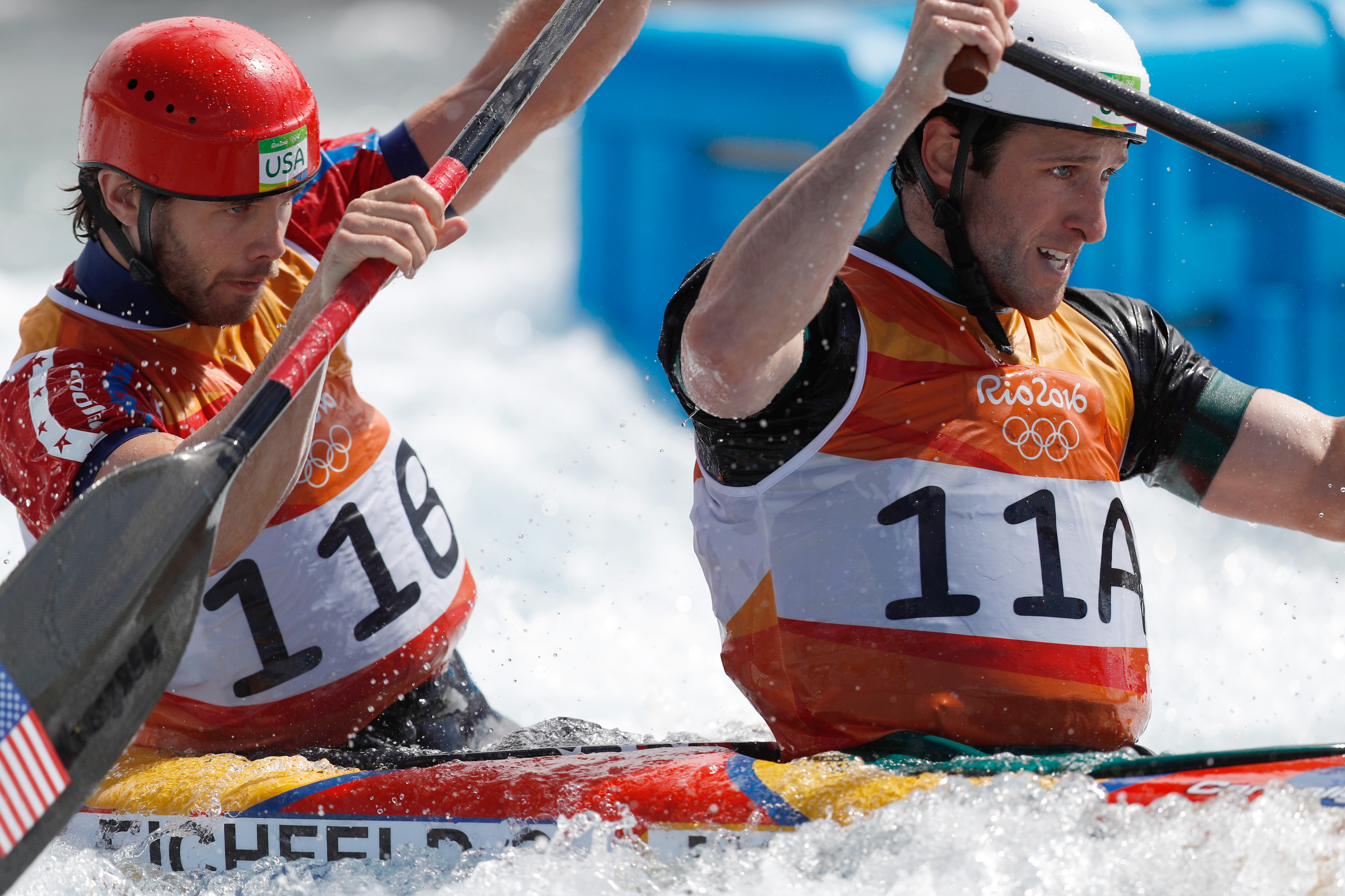 Rio de Janeiro - Norte-americanos Devin McEwan e Casey Eichfeld disputam canoagem slalom categoria C2 nos Jogos Olímpicos Rio 2016 no X Park em Deodoro (Fernando Frazão/Agência Brasil)